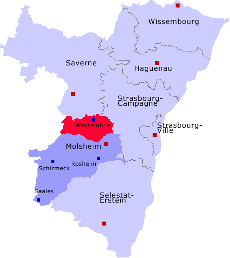 Lage des Kantons Wasselonne im Arrondissement Molsheim und im Département Bas-Rhin